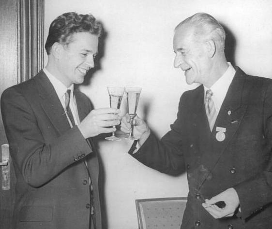 Berlin, Lessing-Medaille an Hacks und Erpenbeck Zentralbild-Sturm 24.1.1956 Verleihung der Lessing-Medaille im Ministerium für Kultur Am 24.1.1956 wurde der Lessingpreis 1956 an die Herren Dr. Peter Hacks und Fritz Erpenbeck durch den Minister für Kultur, Dr. h.c. Johannes R. Becher, verliehen. Zum ersten Mal konnte dieser Preis, der aus zwei Teilen, dem dramatischen und dem literaturkritischen, besteht, voll verliehen werde. Dr. Peter Hacks erhielt für seine Werke "Eröffnung des indischen Zeitalters" und "Die Schlacht bei Lobesitz" den dramatischen Lessingpreis 1956, und Fritz Erpendeck erhielt für seine hervorragenden Leistungen auf dem Gebiete der Theaterkritik denliterakritischen Lessingpreis 1956. UBz: Die beiden Ausgezeichneten: Dr. Peter Hacks ( links) und Fritz Erpenbeck stoßen miteinander an. Abgebildete Personen: Hacks, Peter Dr.: Schriftsteller, DDR Erpenbeck, Fritz: Schriftsteller, Theaterkritiker, DDR (GND 116567635)